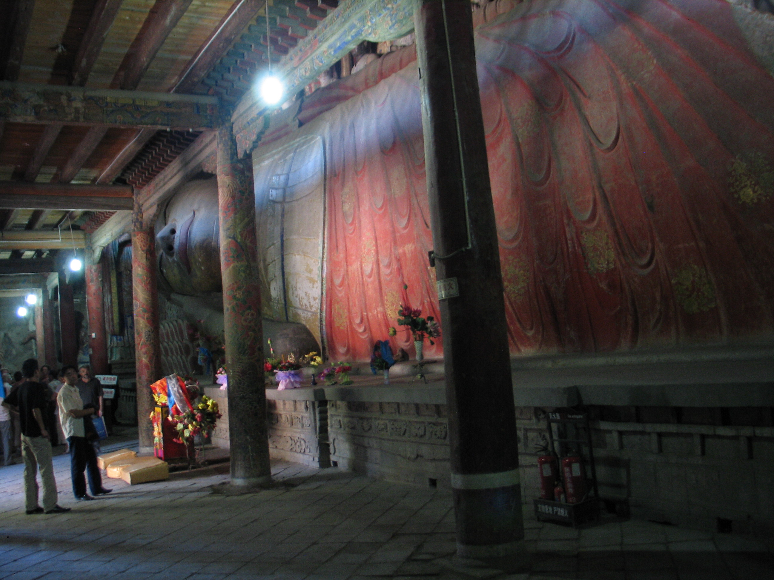 Großer Buddha in Zhangye, China